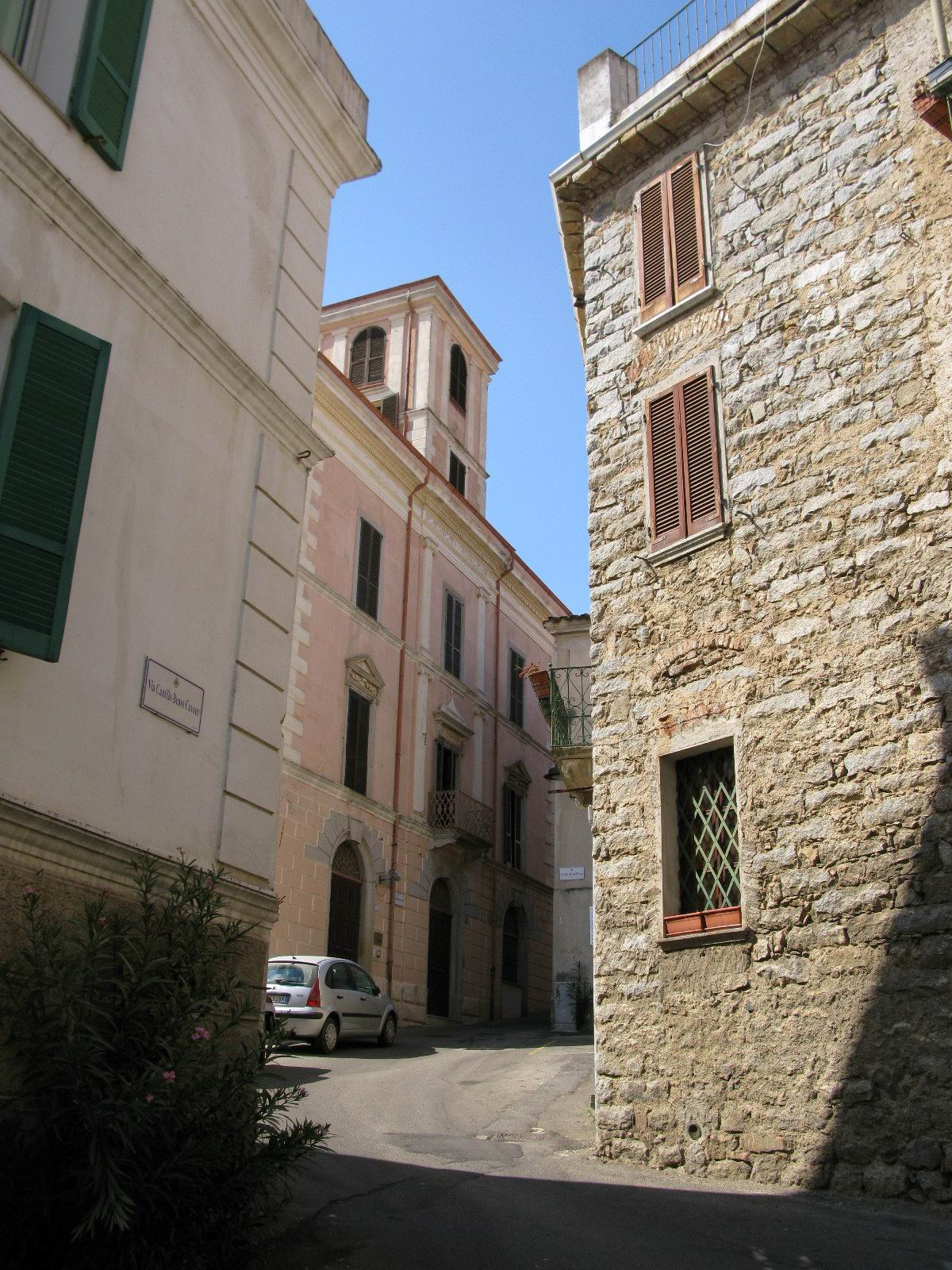 scorci di Nuoro